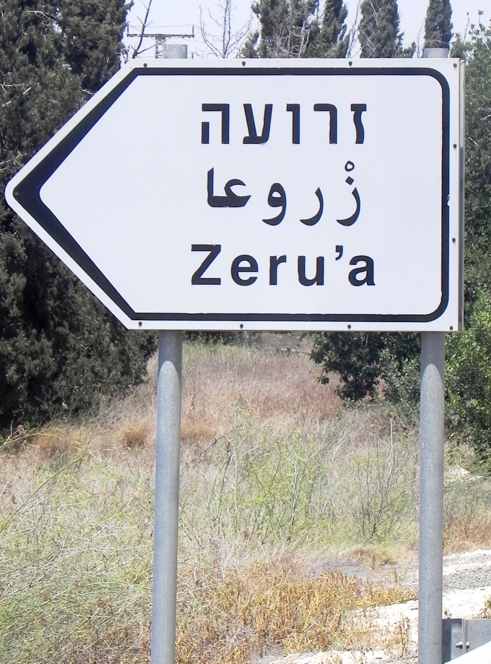 זרועה שלט הכניסה למושב